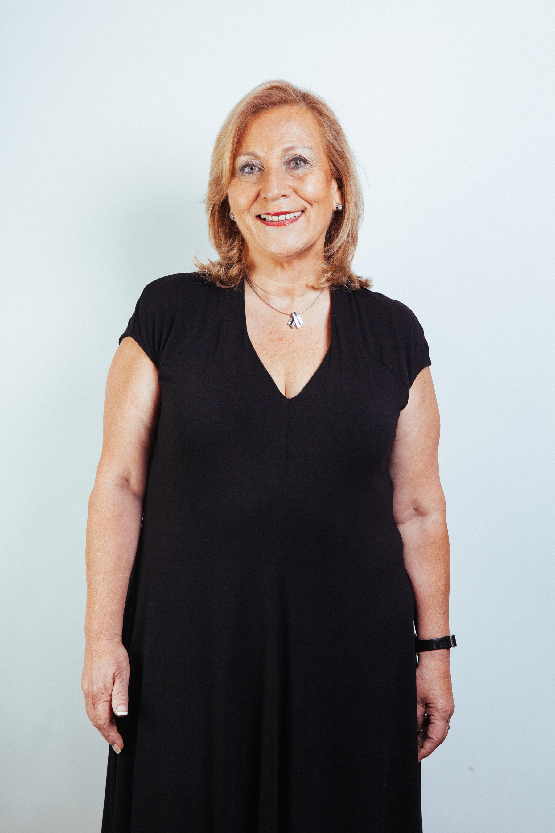 Ministro de Estado del segundo gobierno de Michelle Bachelet (2014-2018)